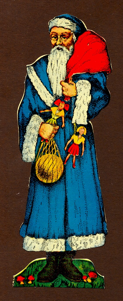 Chromo pain d'épices Père Noël